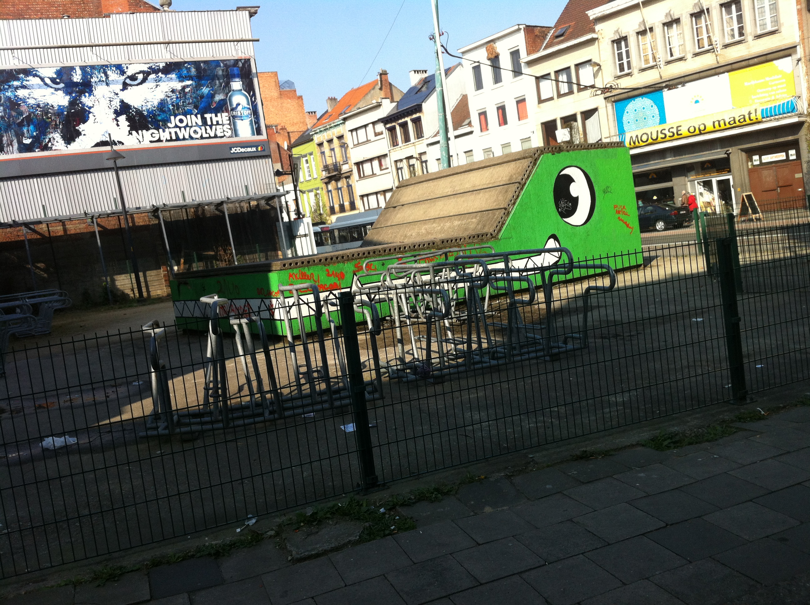 Bouche de métro Drink